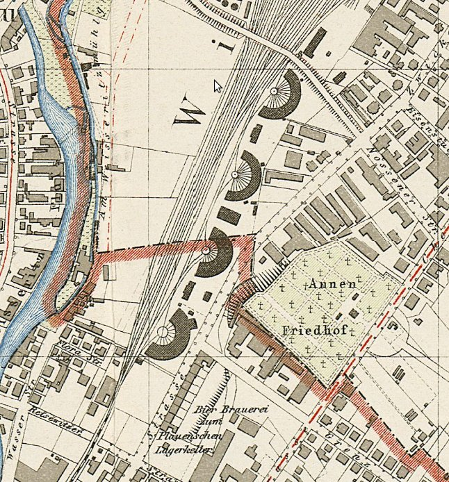 Lage des Bahnbetriebswerks Dresden-Altstadt in 1900